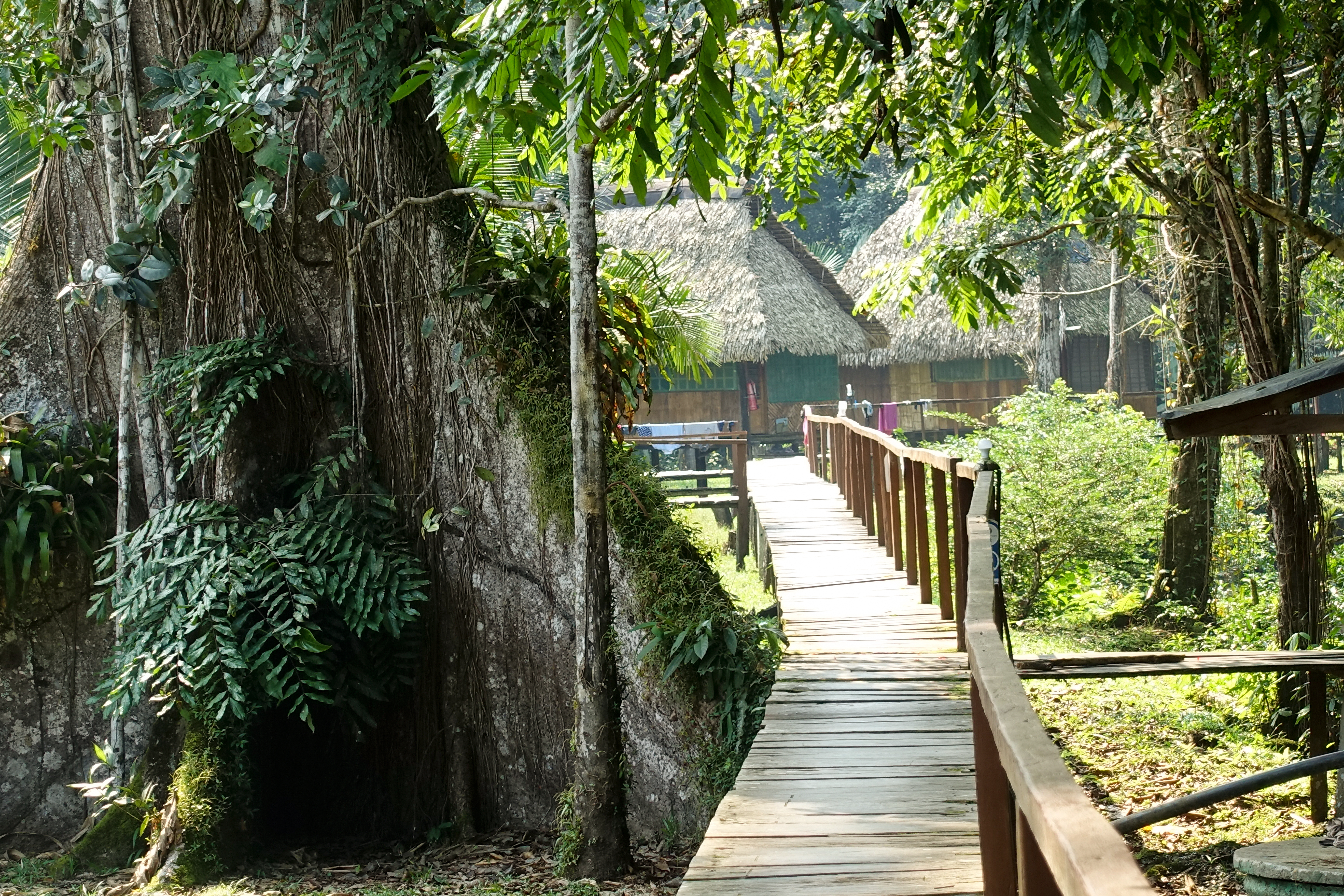 Cuyabeno River Lodge am gleichnamigen Fluss in Ecuador, westlich der Straße E10 im Cuyabeno Wildtier-Reservat. Im Vordergrund ein Kapokbaum.